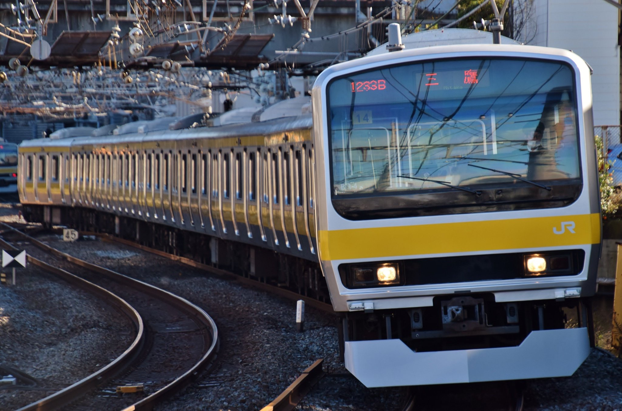 E231系0番台ミツB14編成 中央・総武緩行線千葉-西千葉